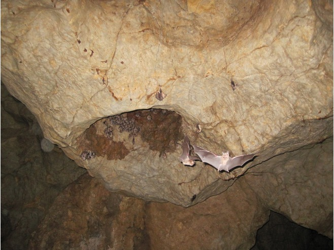 Бела Вода- Демир Капија